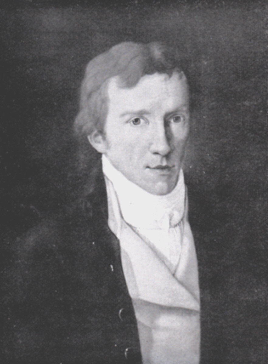 Anton Karl Freiherr von Baden (1770–1830); Mitglied der 1. Kammer der badischen Ständeversammlung 1819-1822